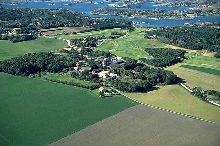 Morlanda säteri och kyrka. Morlanda 278:1. Motiv: Morlanda Nyckelord: Flygbilder, Naturreservat, Riksintressen Kategori: Herrgårds-/slottslandskap Morlanda säteri och kyrka. Morlanda 278:1.